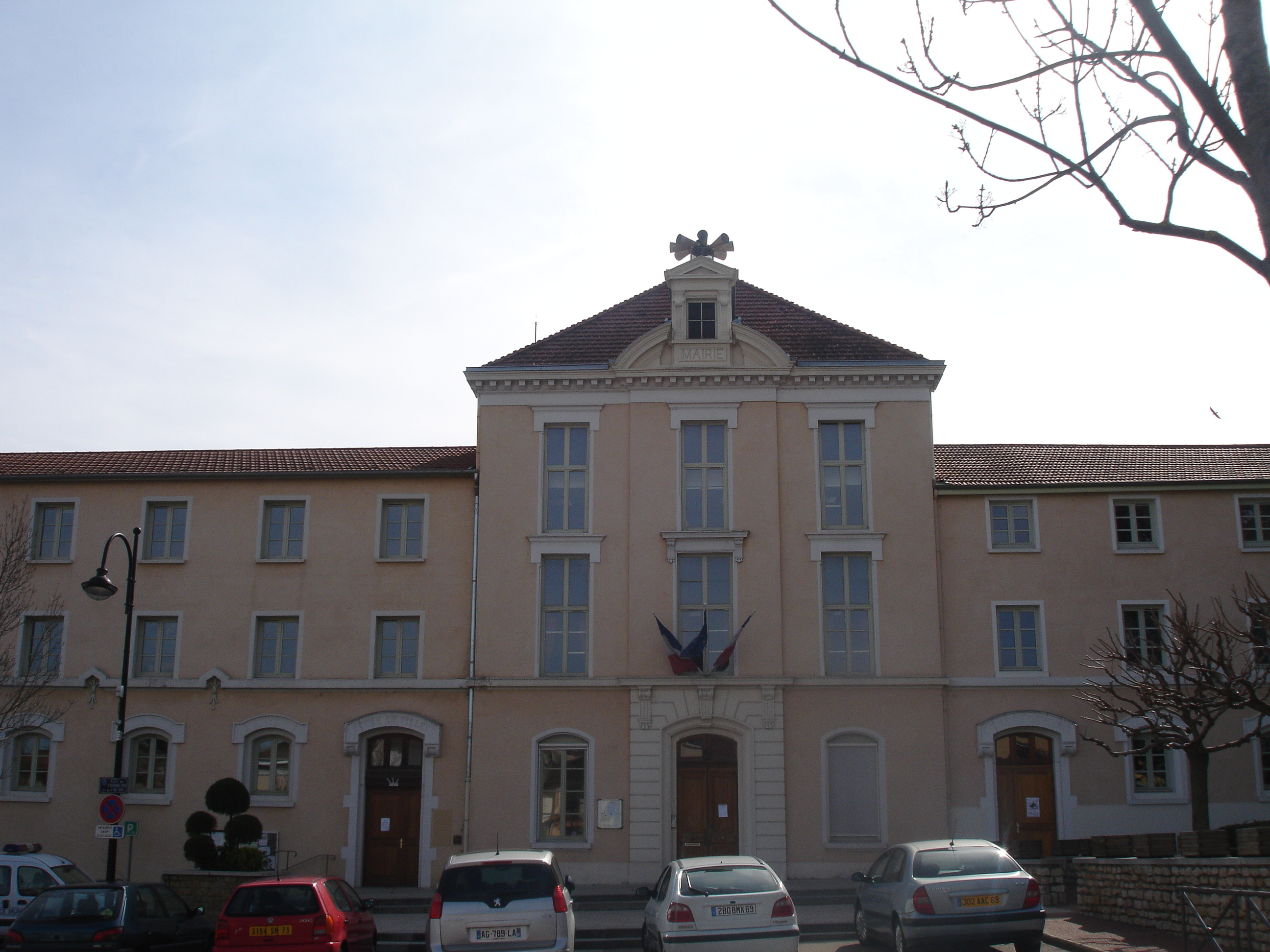 Vernaison (69) : La mairie